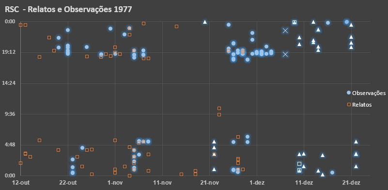 Imagem de gráfico elaborado no programa excel com dados compilados do documento vazado Resumo Sintético-Cronológico do I COMAR com relatos e observações registrados no ano de 1977. As esferas azuis indicam as observações militares. Essa observações são aquelas onde pelo menos um membro de equipe da seção de informações da Aeronáutica esteve presente, independente se acompanhado de civis ou não. Os quadrados laranjas vazios, indicam as observações relatadas por civis aos agentes da aeronáutica. Os triângulos são um extrato particular das observações militares: são aquelas oriundas dos relatórios extras do sargento Flávio Costa, um conjunto de relatórios elaborados após vigílias particulares na Baia do Sol. As marcações "X" são observações militares de Hollanda e civis na Baia do Sol. Os quadrados brancos vazios são as observações militares dos agentes no Rio Içui-Guajará. Elaboração e pesquisa por Hélio Aniceto, para o livro Corpos Luminosos.